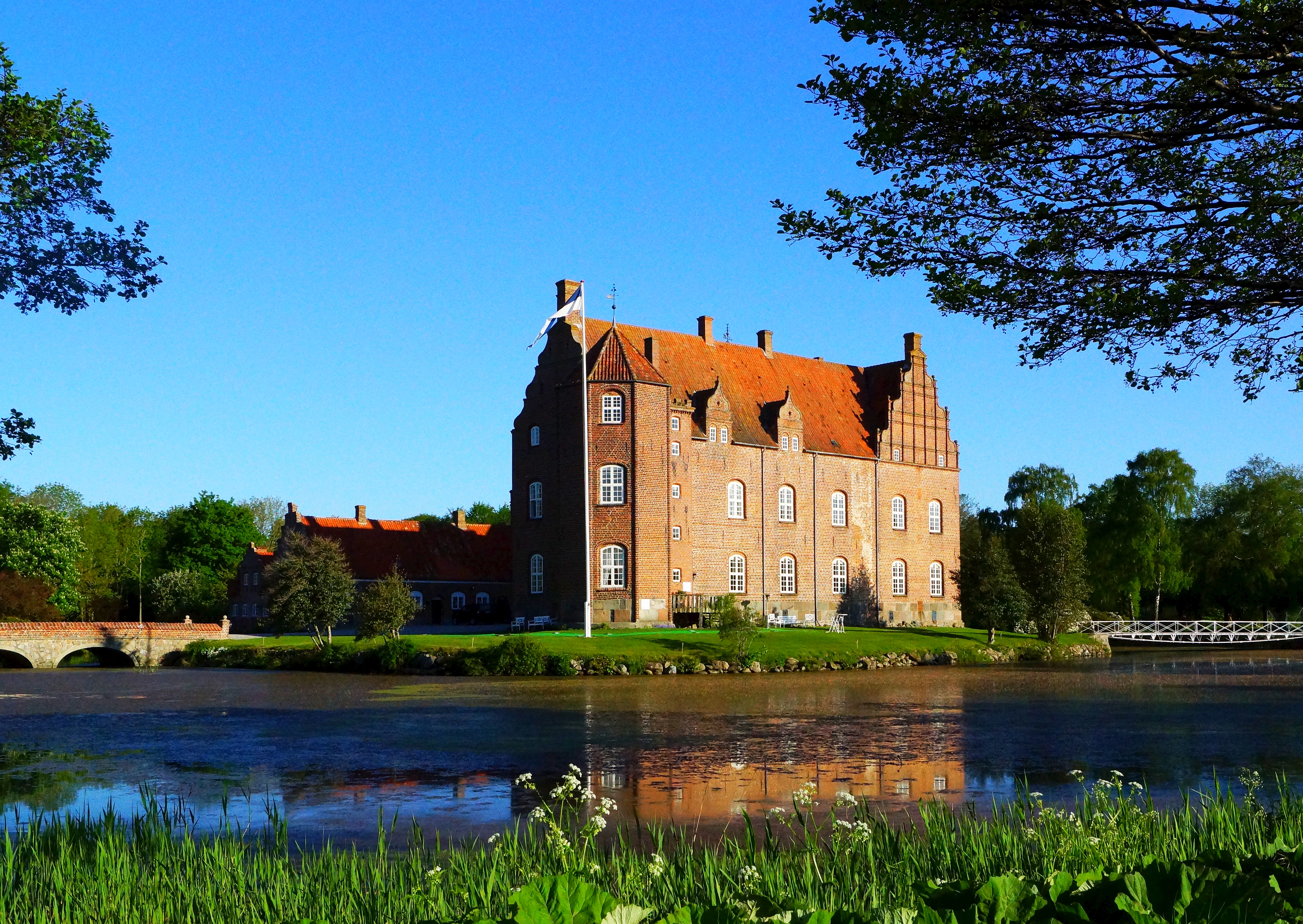 Katholm Slot